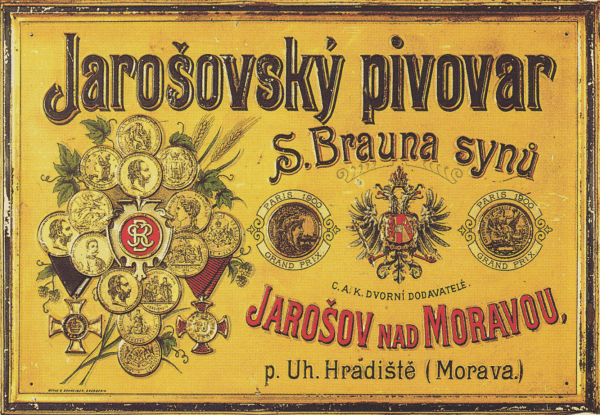 Reklamní tabule Jarošovského pivovaru